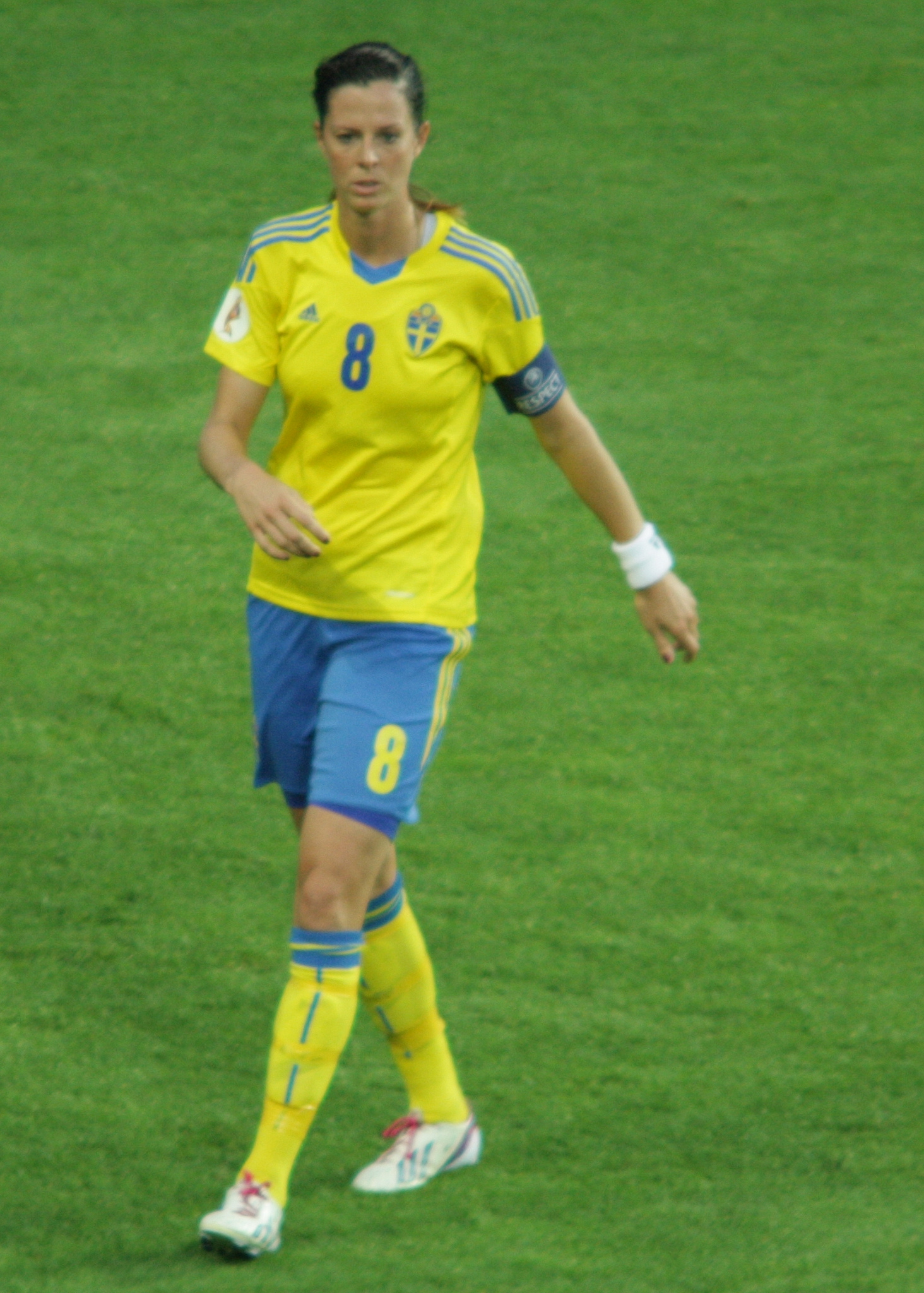 Lotta Schelin